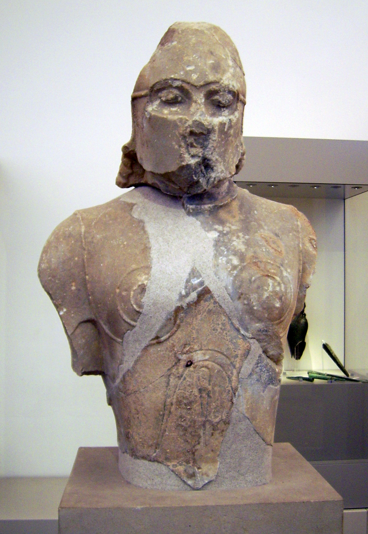 Samischer Hoplit, zweite Hälfte des 6. Jahrhunderts v. Chr., gefunden zu Beginn des 20. Jahrhunderts im Heraion von Samos, Inventarnummer Berlin 1752, der Antikensammlung Berlin, ausgestellt im Alten Museum Berlin